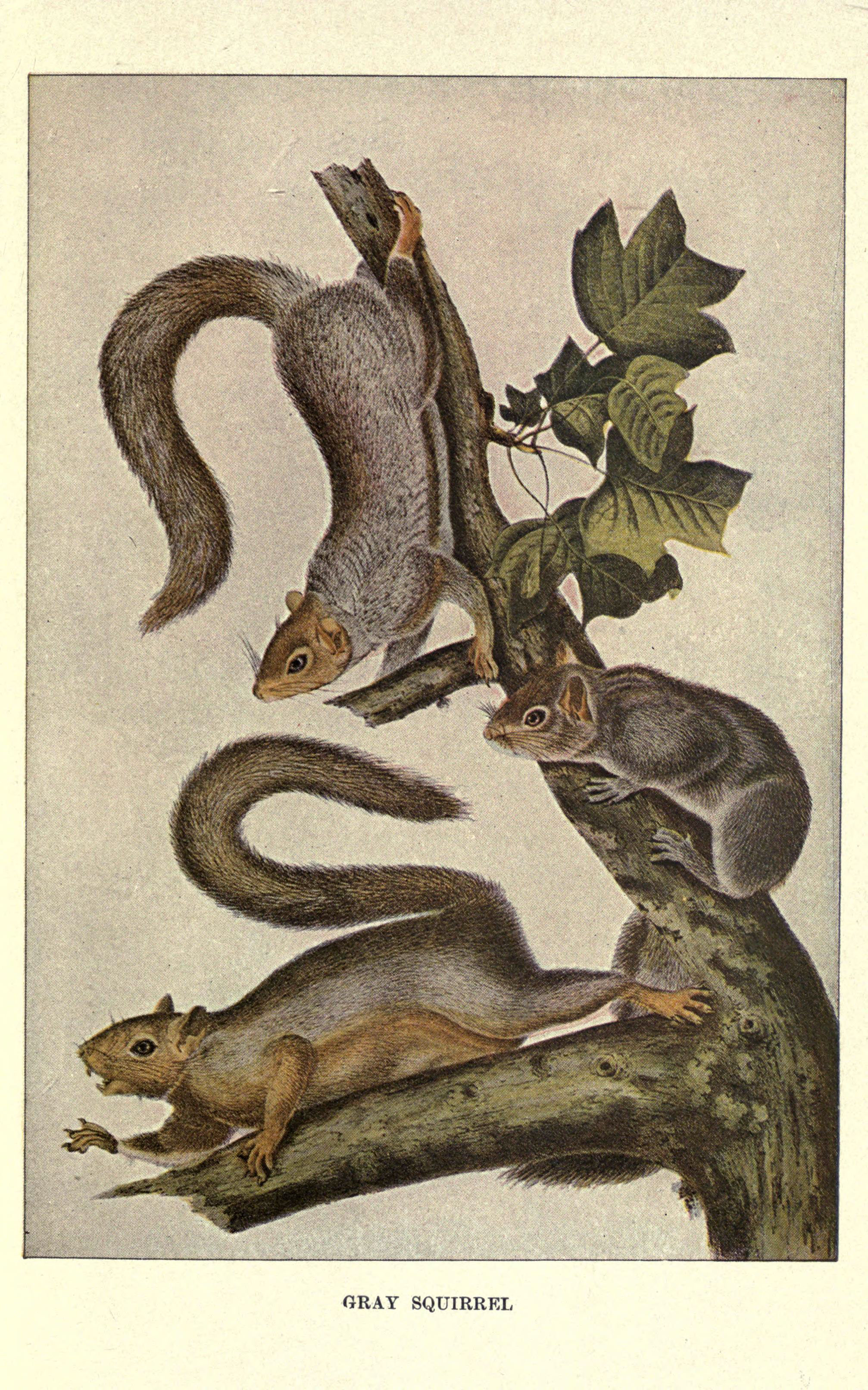 GRAY SQUIRREL